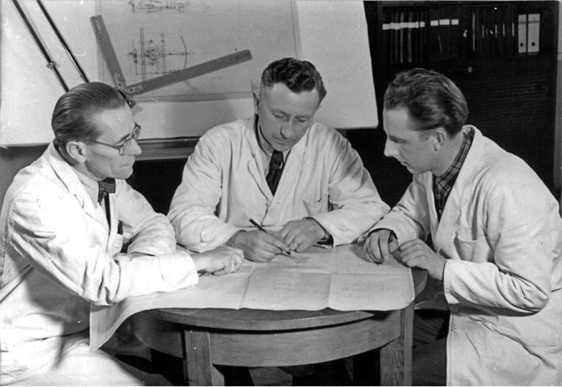 Ingenieure mit Konstruktionsplan Zentralbild TBD-Wittig 18.3.1954 VEB Optima entwickelet Kinderschreibmaschine. Im volkseigenen Betrieb Optima, Erfurt, wurde eine Kinderschreibmaschine entwickelt. Diese Eintastenschreibmaschine in robuster Ausführung mit Normaltypen gelangt im vierten Quartal 1954 zur Auslieferung. Um den Kindern das Schreiben zu erleichtern, wurde auf das übliche Tastenfeld verzichtet. Mit einem Hebel läst sich der gewünschte Buchstabe einstellen und anschlagen. Die Schriftplatten sowie die Typenwalze sind auszuwechseln, so wird es möglich, auch russisch, englisch und französisch auf der Maschine zu schreiben. Sie zeichnet sich durch ihr leichtes Gewicht und durch ihre ansprechende Farbe aus. UBz: Die Kinderschreibmaschine wurde durch ein Konstruktionskollektiv des Betriebes entwickelt. vlnr: Die Konstrukteure Hielscher, Heinig und Oehmichen.